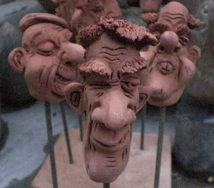 Lintus e Pintus von Gigi Porceddu